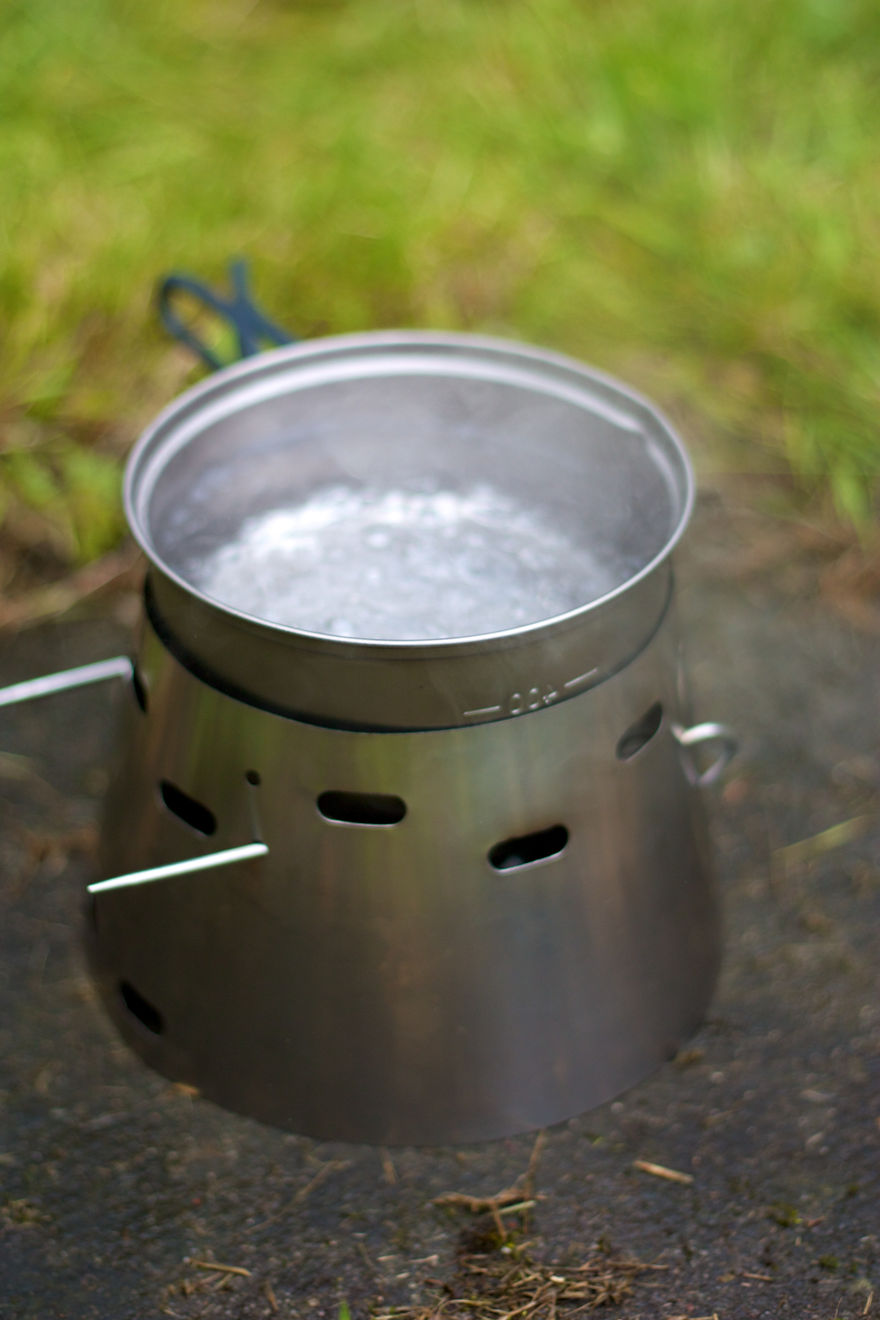 Abkochen von Wasser mit einem handelsüblichen Outdoor-Kochset für Esbit oder Brennspiritus („Caldera Cone Stove System“).